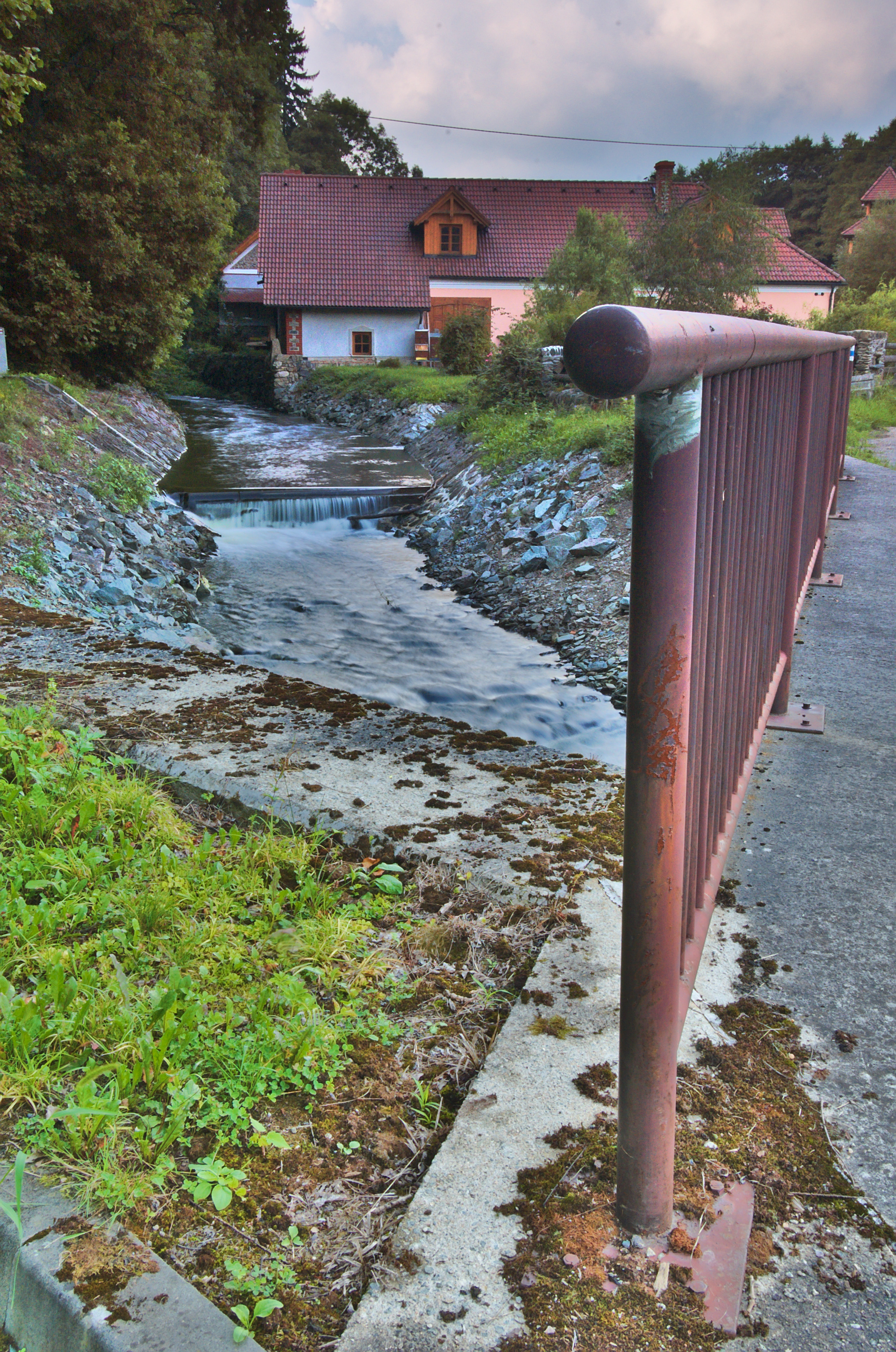 Bělá v Melkově, Okrouhlá, okres Blansko